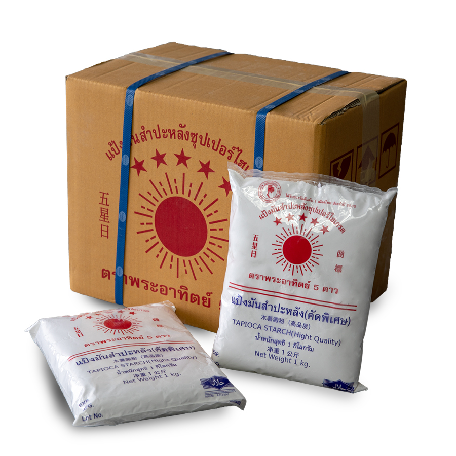 ตัวอย่างสินค้าในตลาด